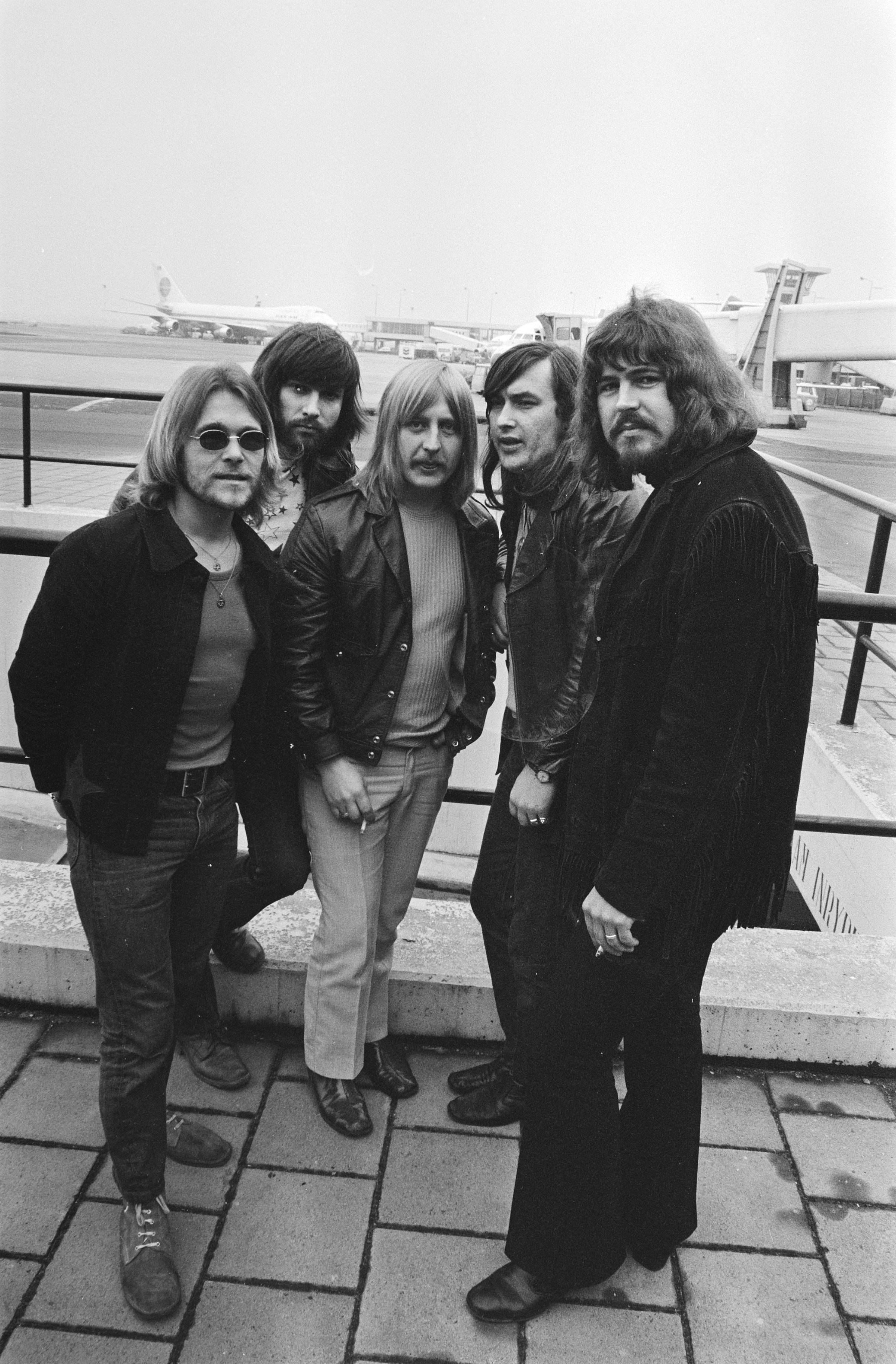 Collectie / Archief : Fotocollectie Anefo Reportage / Serie : Volendamse popgroep The Cats op Schiphol voor het vertrek naar Indonesië Beschrijving : Bandleden Cees Veerman, Piet Veerman, Jaap Schilder, Arnold Mühren en Theo Klouwer Datum : 9 maart 1971 Locatie : Noord-Holland, Schiphol Trefwoorden : groepsportretten, muzikanten, popgroepen Persoonsnaam : Klouwer, Theo, Mühren, Arnold, Schilder, Jaap, Veerman, Cees, Veerman, Piet Fotograaf : Fotograaf Onbekend / Anefo, [onbekend] Auteursrechthebbende : Nationaal Archief Materiaalsoort : Negatief (zwart/wit) Nummer archiefinventaris : bekijk toegang 2.24.01.05 Bestanddeelnummer : 924-3410